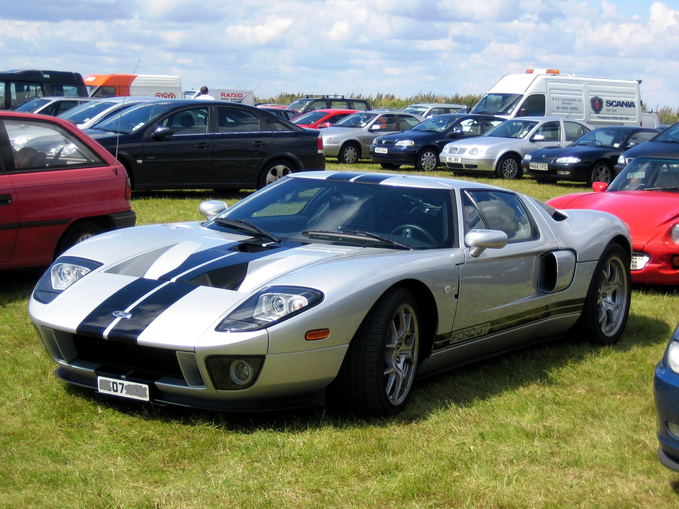 Ford GT Not 40 in Norfolk